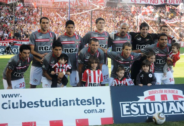 El equipo de Estudiantes de La Plata, la tarde en que se coronó campeón del Torneo Apertura 2010 del fútbol argentino tras derrotar a Arsenal de Sarandí por 2-0. Arriba: Leandro Desábato, Marcos Rojo, Federico Fernández, Juan Sebastián Verón, Agustín Orión y Germán Ré; abajo: Rodrigo Braña, Enzo Pérez, Leandro Benítez, Gastón Fernández y Gabriel Mercado.